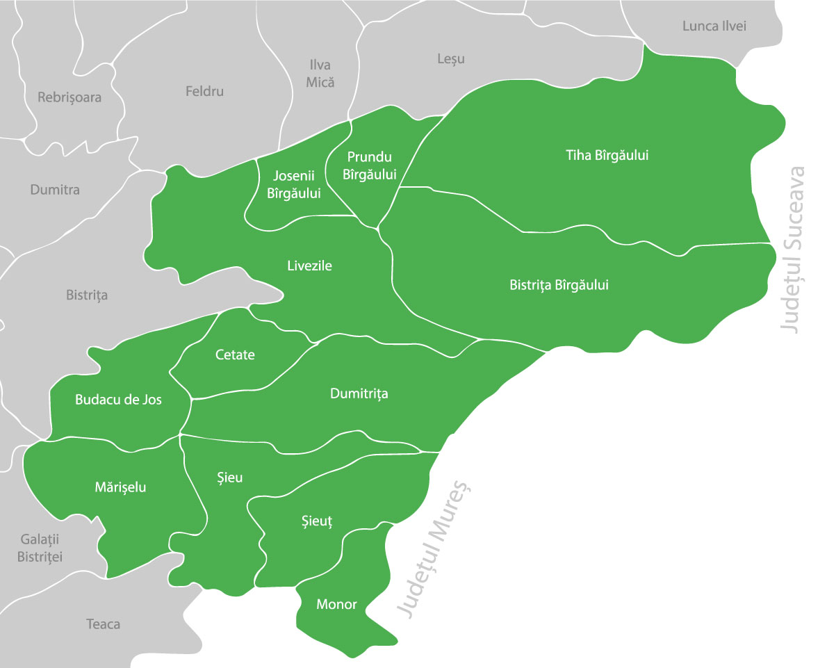 Harta teritoriului FDZR Bârgău-Călimani